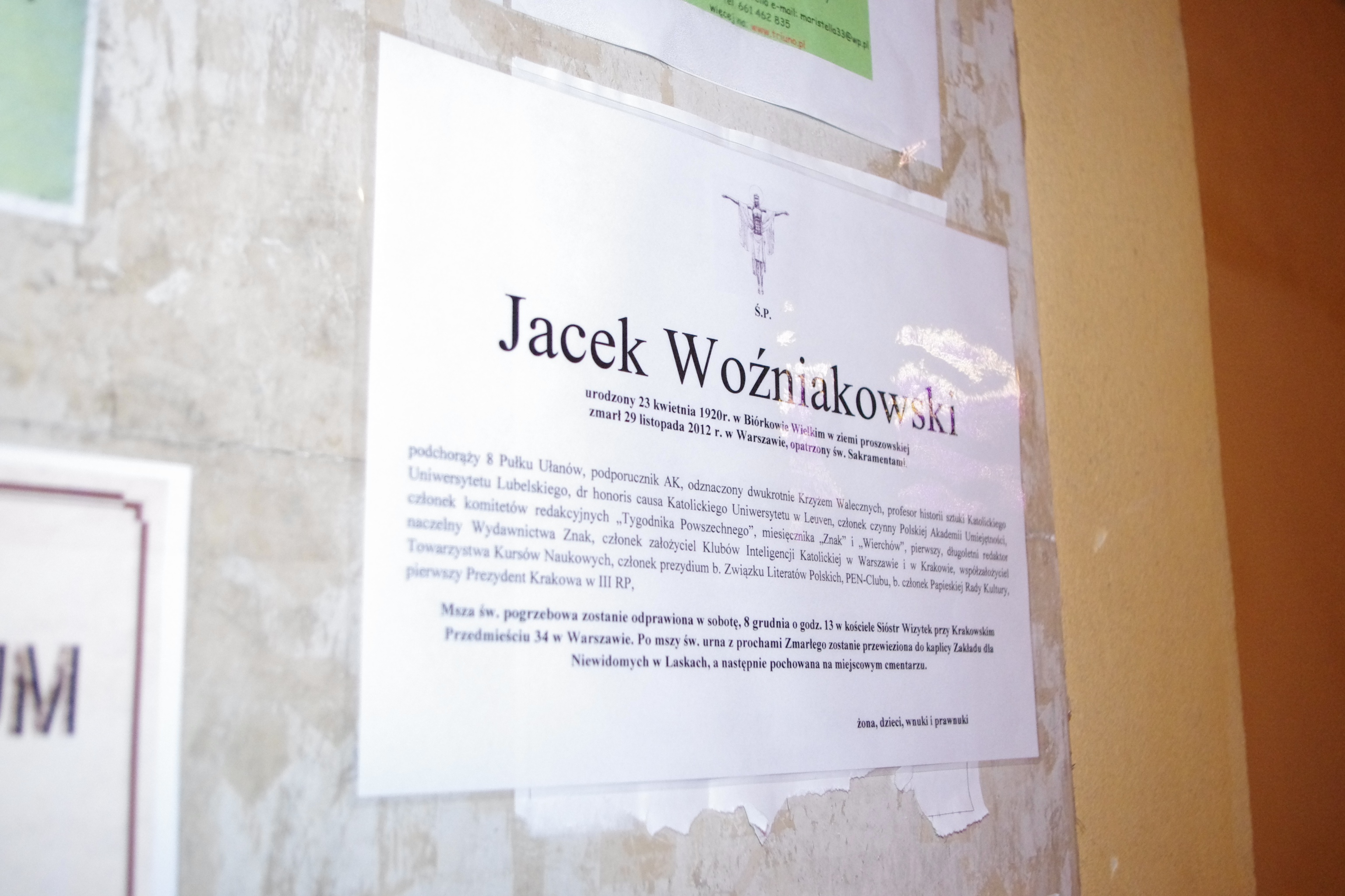 Nekrolog historyka i wydawcy Jacka Woźniakowskiego (1920-2012) przy wejściu do Kościóła św. Marcina przy ul. Piwnej w Warszawie